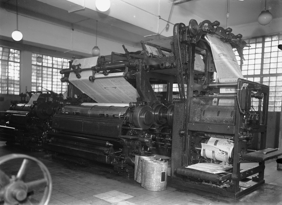 דבר מכונת רוטציה 1937